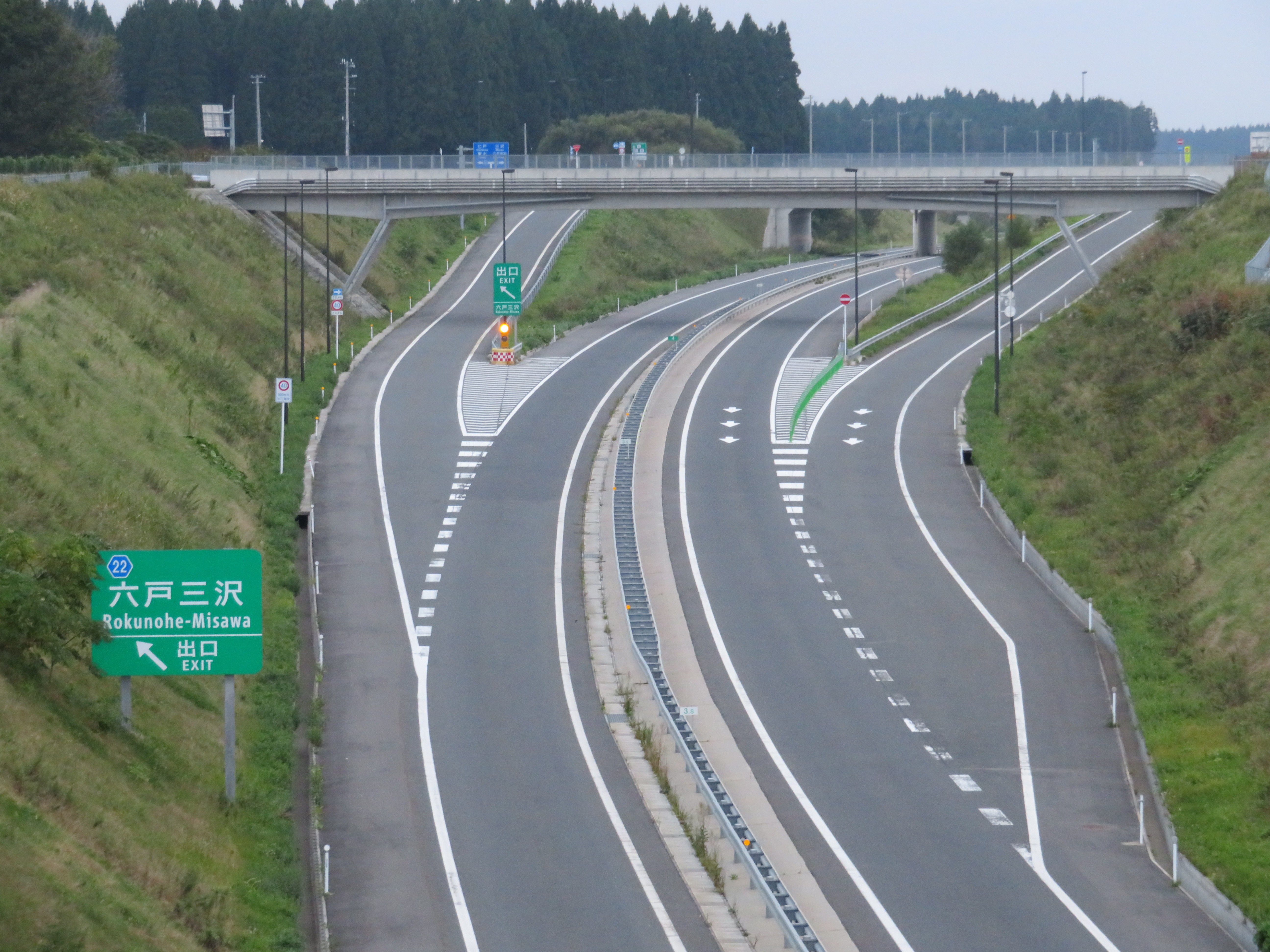 上北自動車道六戸三沢インターチェンジ出入口付近（八戸方面側から撮影） Canon PowerShot SX720 HS